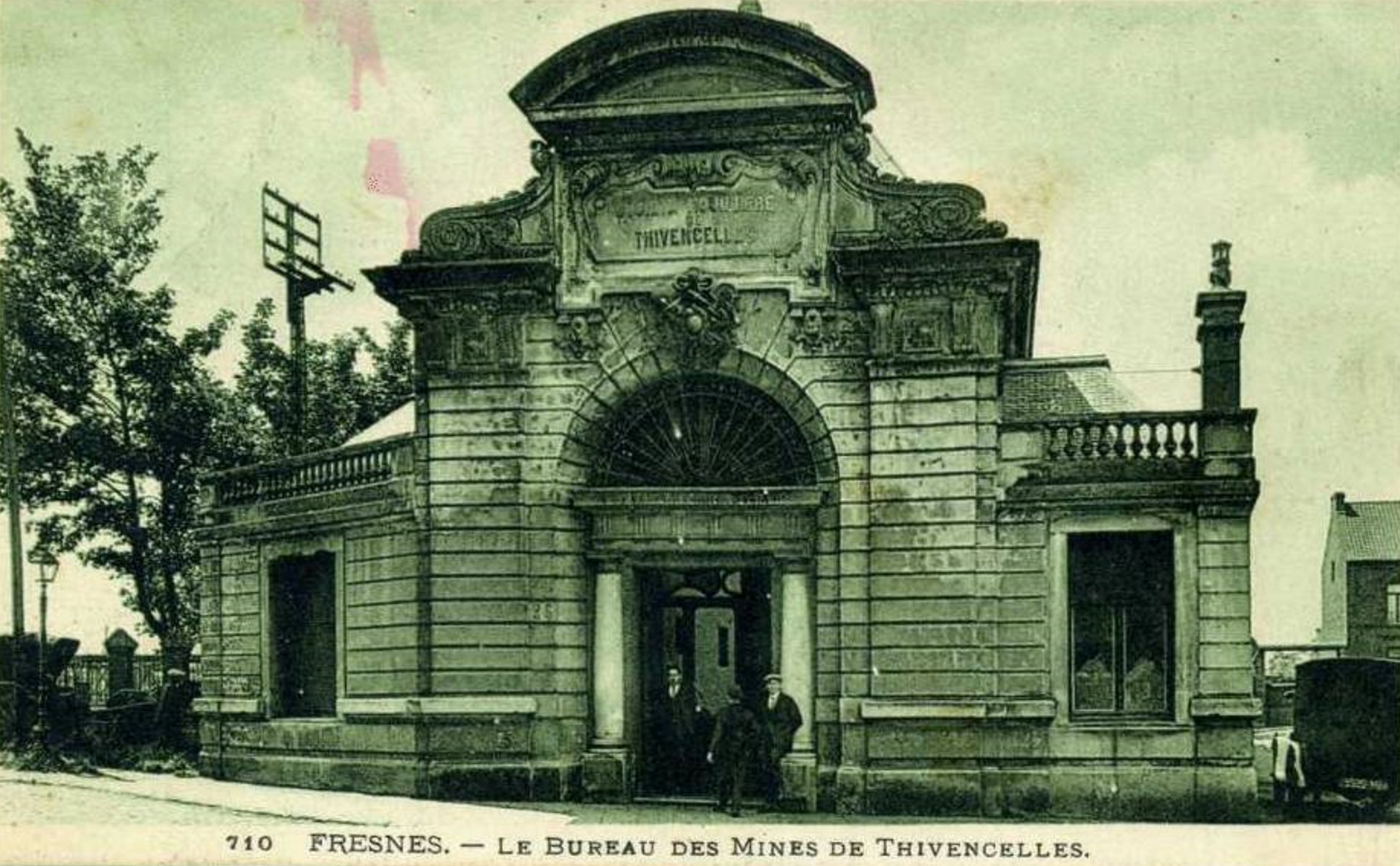 Grands bureaux des Mines de Thivencelle à Fresnes-sur-Escaut, Nord, Nord-Pas-de-Calais, France.